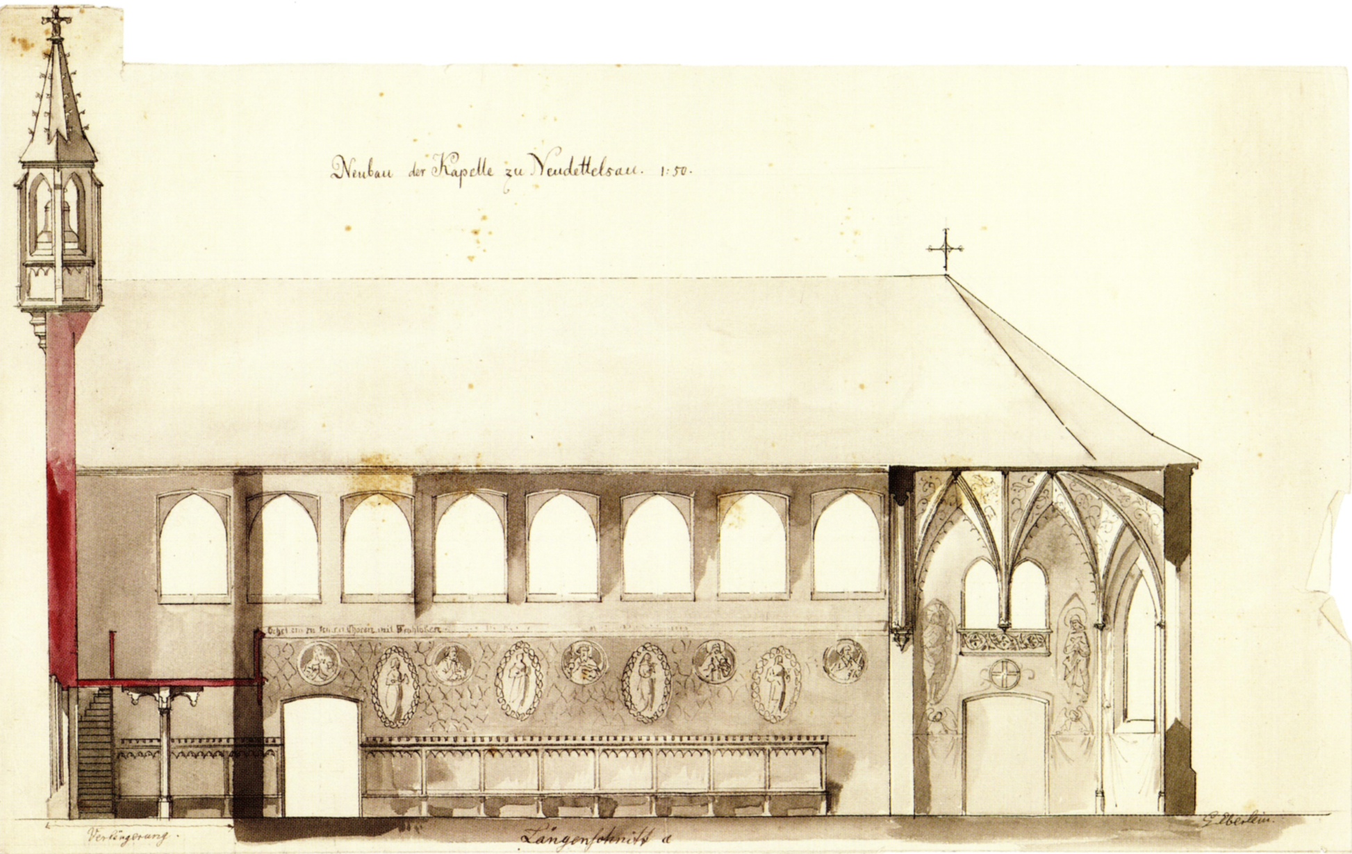 St.-Laurentius-Kirche in Neuendettelsau. Entwurf für eine Erweiterung des Betsaals nach Westen, Längsschnitt.